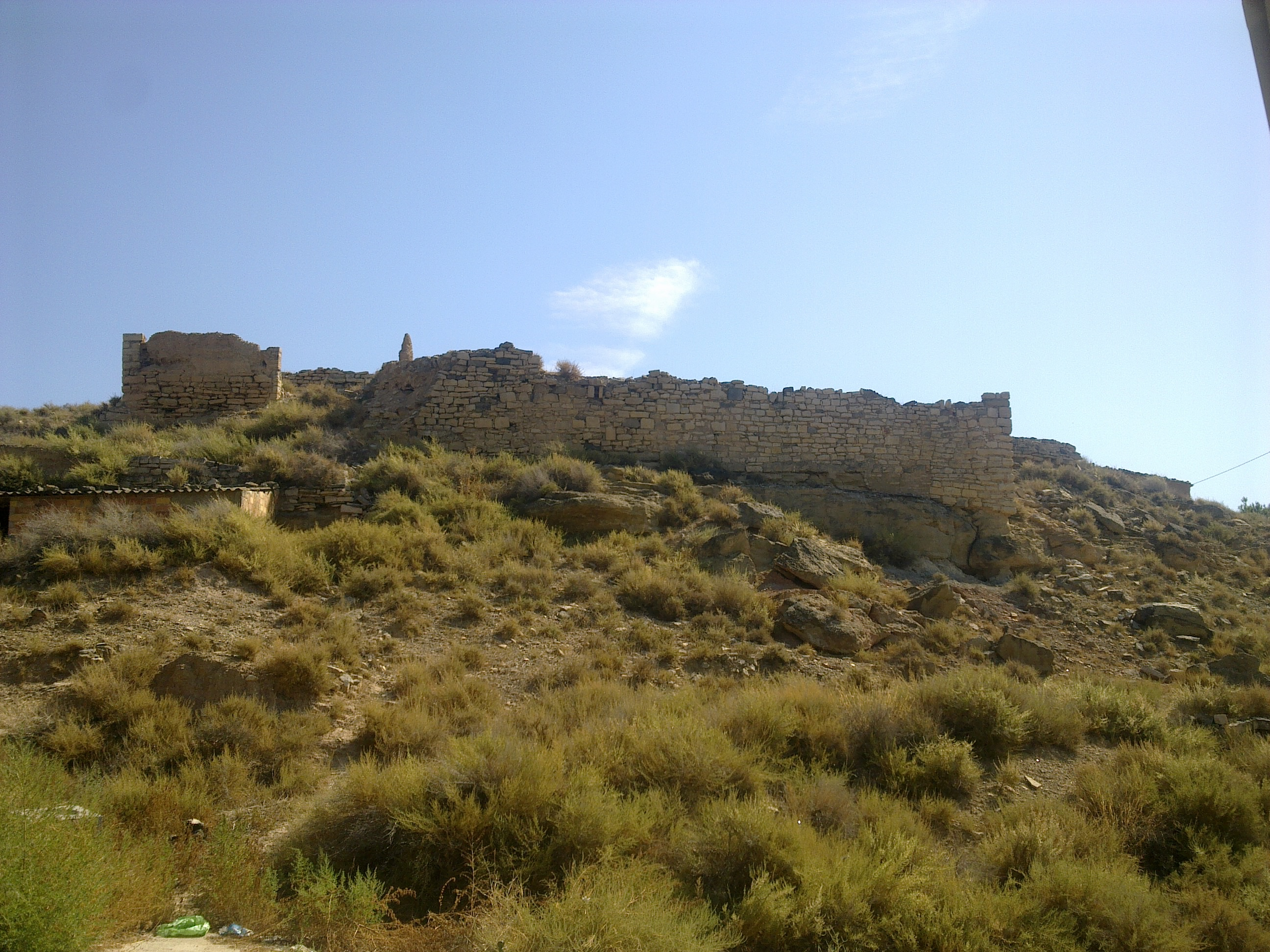 Castell d'Aitona, o Palau d'Aitona Romànic segles XII - XIII, XV - XVI